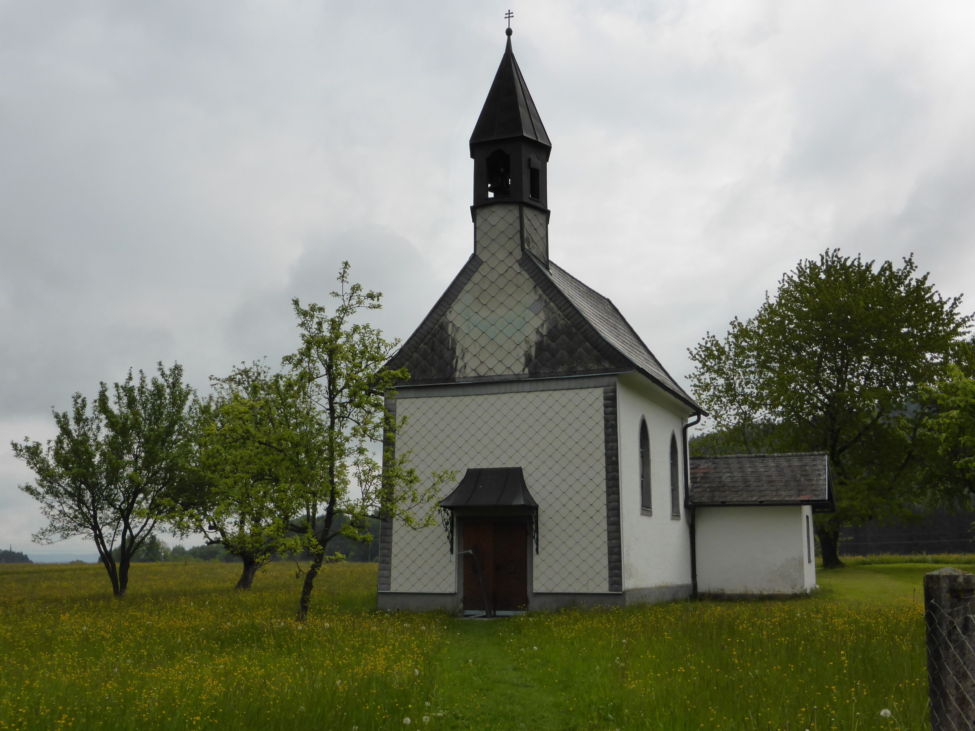 Kapelle hl. Familie in Jagdhub